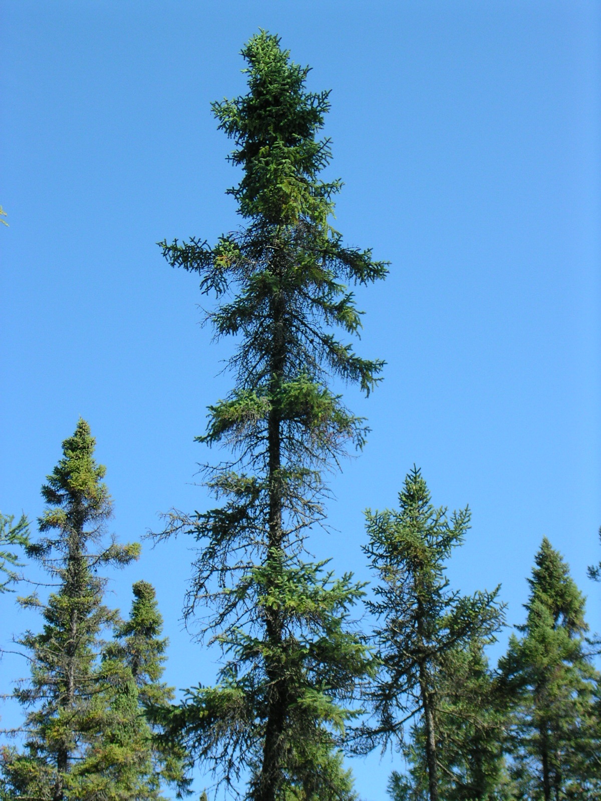 Picea mariana 5